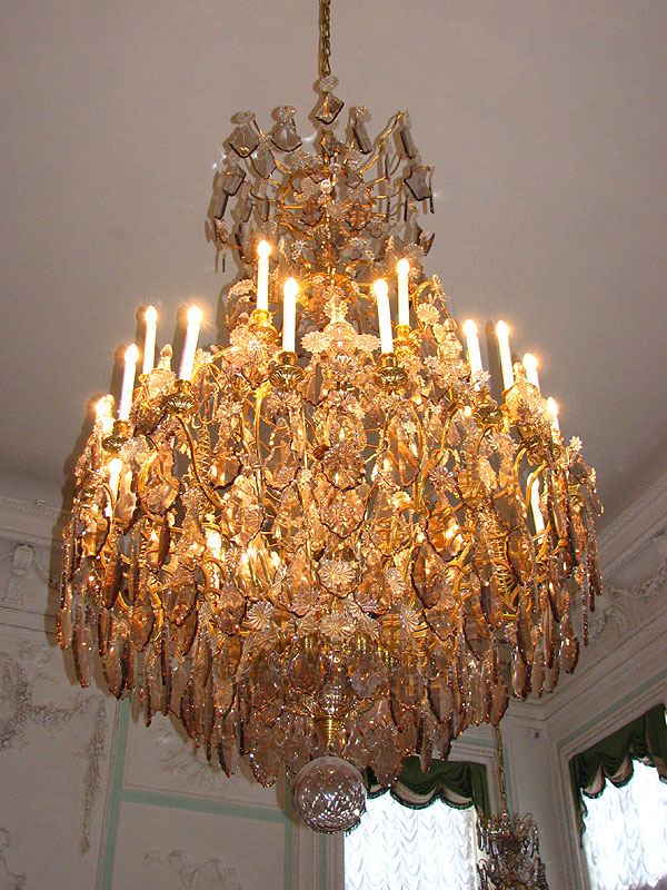 Столовая